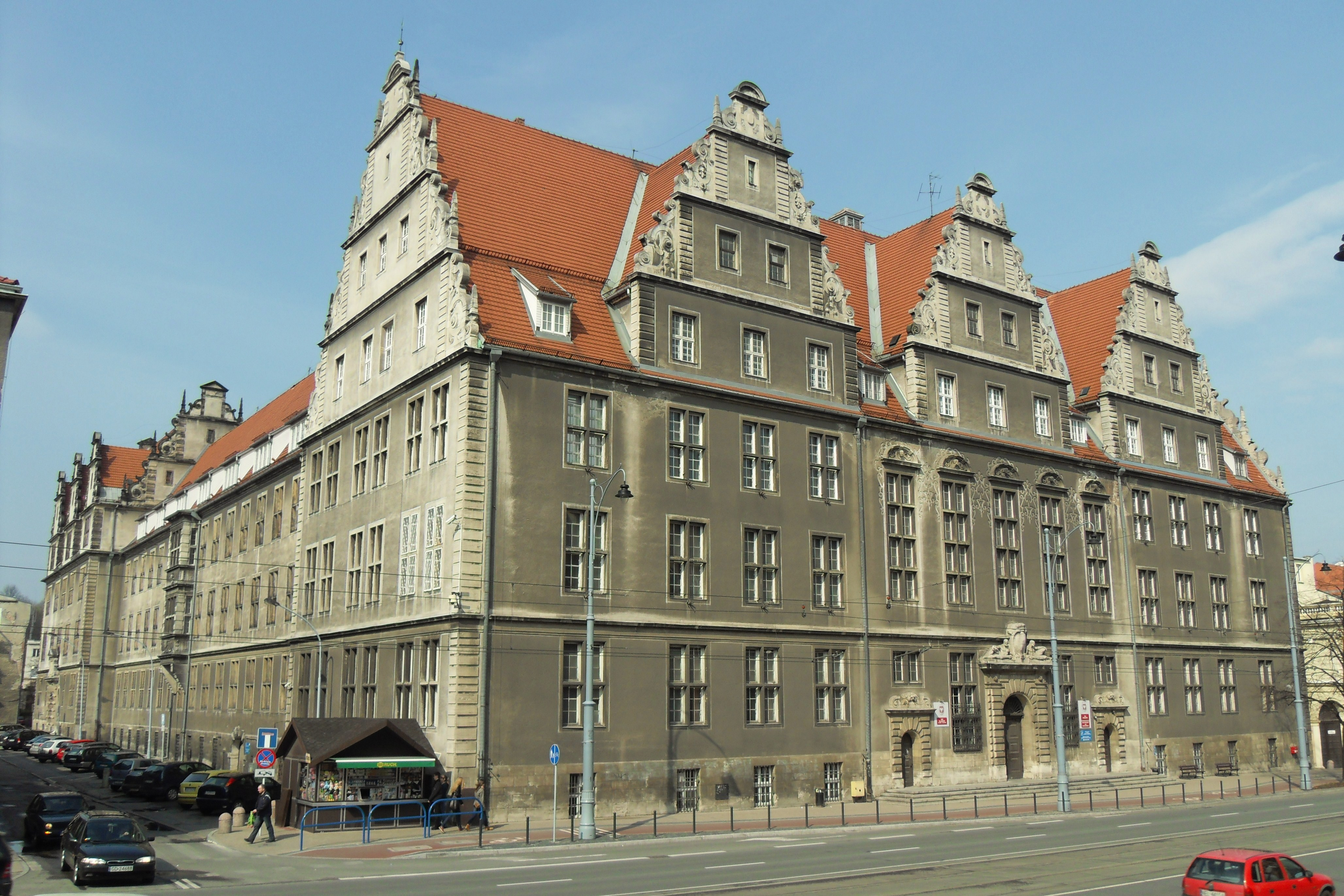 Gdańsk Śródmieście, ul. Nowe Ogrody 30/34. Siedziba konsulatu niemieckiego w latach 1920-1922